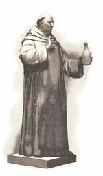 Estatua Dom Pérignon